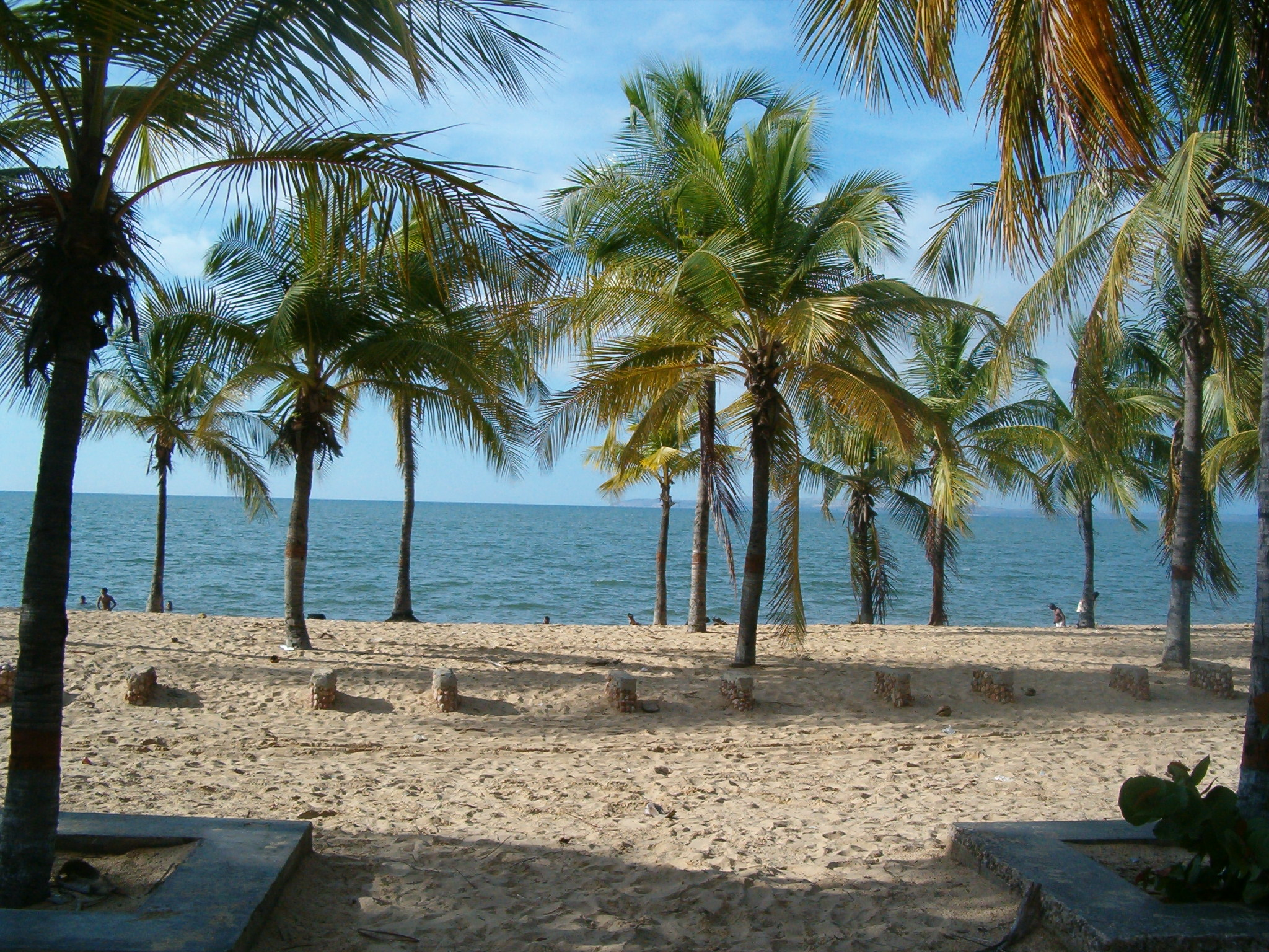 Playa San Luis Cumana